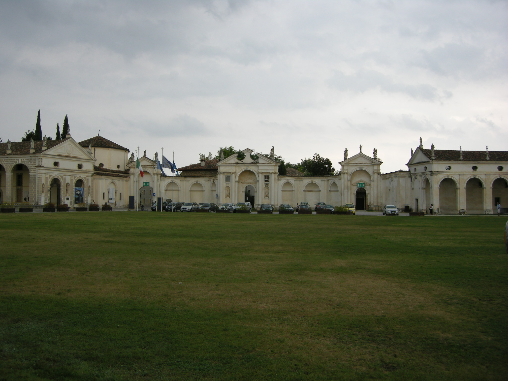 Villa manin, esedra